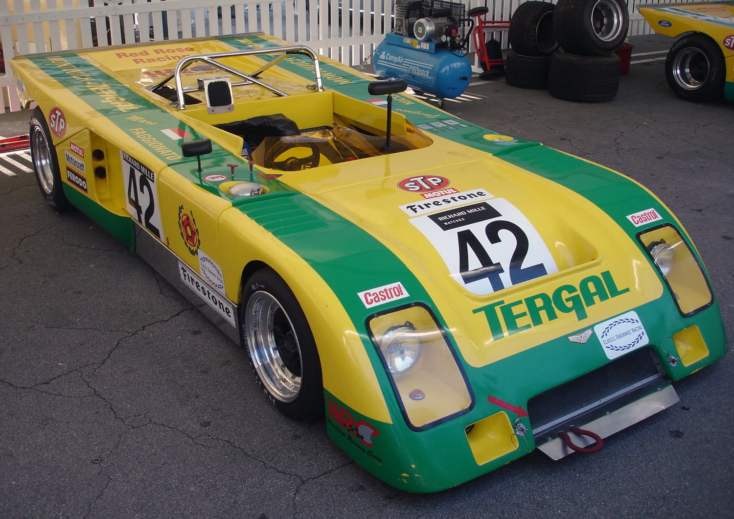 Chevron B21 (Montjuic Tergal Car 2) exposat al festival Martini Legends (commemoració del 75 aniversari del Circuit de Montjuïc)